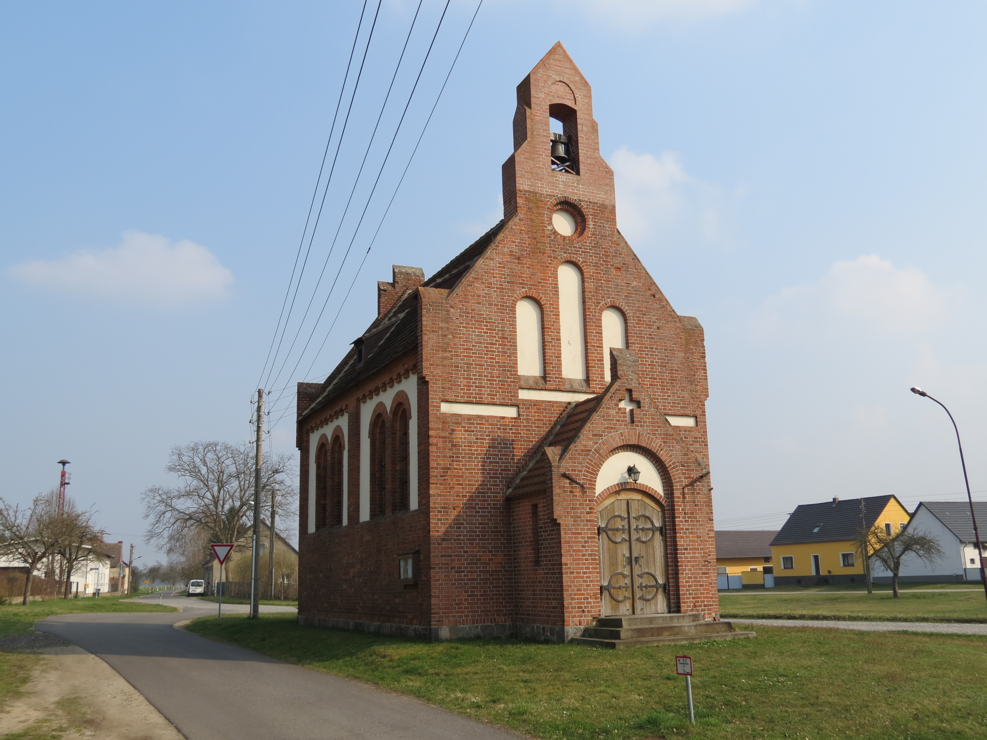 Leeskow, Ortsteil von Jamlitz, Lkr. Dahme-Spreewald, Brandenburg, Deutschland, Dorfkirche, Blickrichtung von Nordwesten